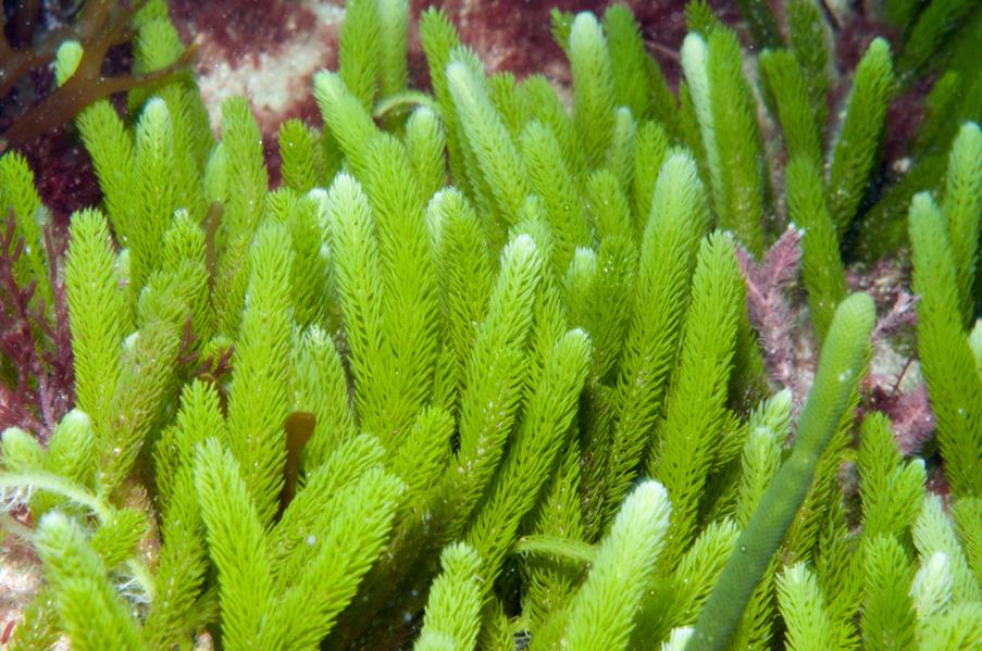 Caulerpa brownii